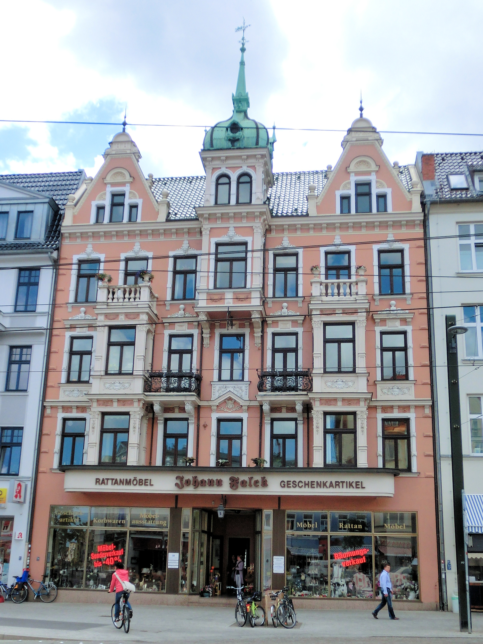 Rostock Wismarsche Strasse 5 Baudenkmal